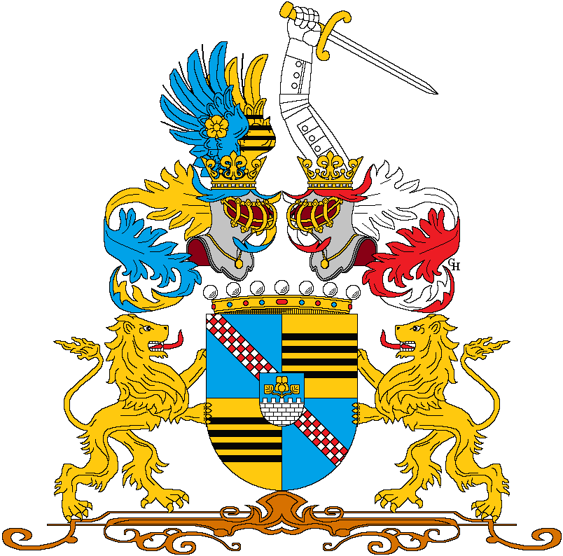 Wappen des k.u.k. Feldzeugmeisters Stephan Ljubičić (1855–1935), verliehen anlässlich seiner Erhebung in den österreichischen Freiherrenstand 1916. Zeichnung von Gerd Hruška ( Für weitere Informationen zu dieser Standeserhebung siehe (